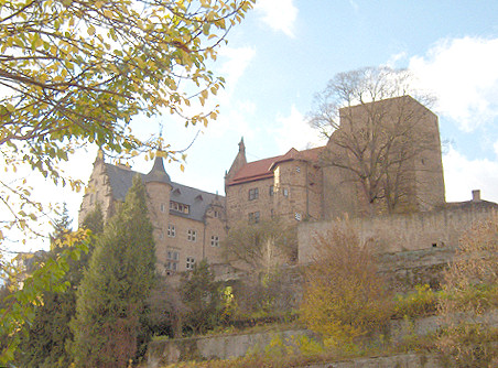 Burg Adelebsen (selbst photographiert)- GNU-FDL